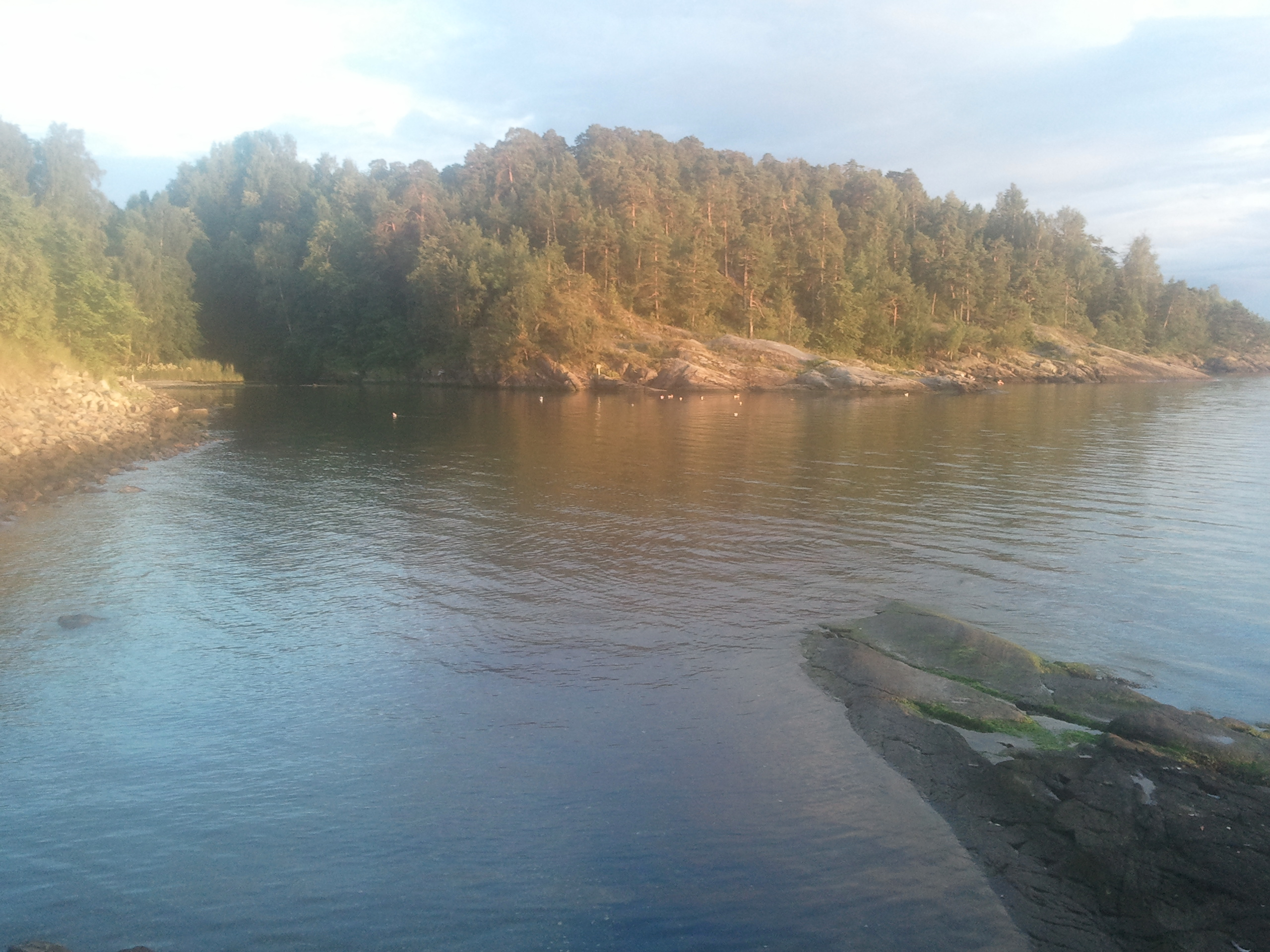 Fiskevollbukta at Bunnefjorden in Oslo, Norway